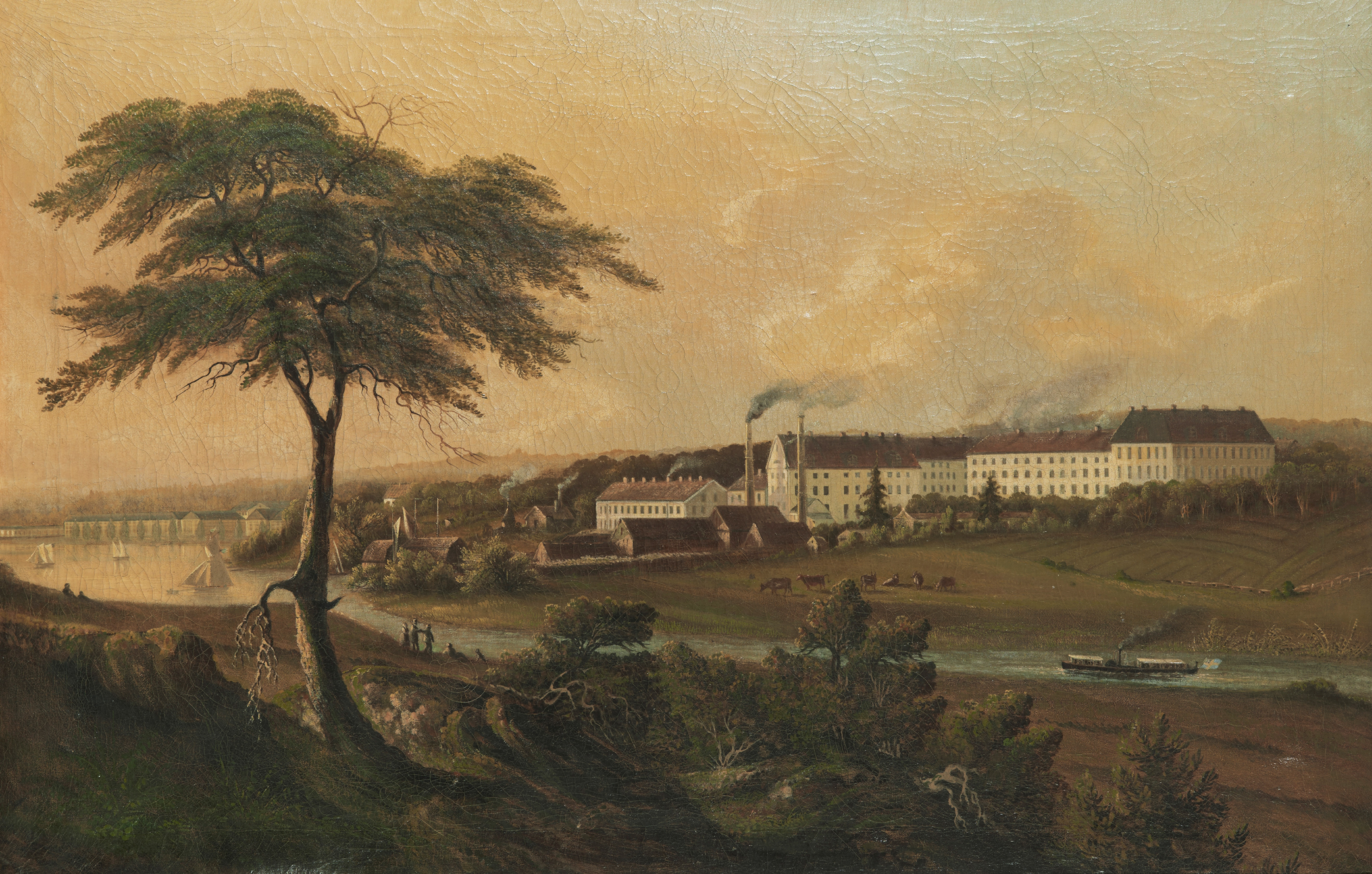 Rörstrands porslinsfabrik tidigt 1860-tal, innan stambanan drogs på fabrikstomten 1866. Nere till höger syns en ångbåt.